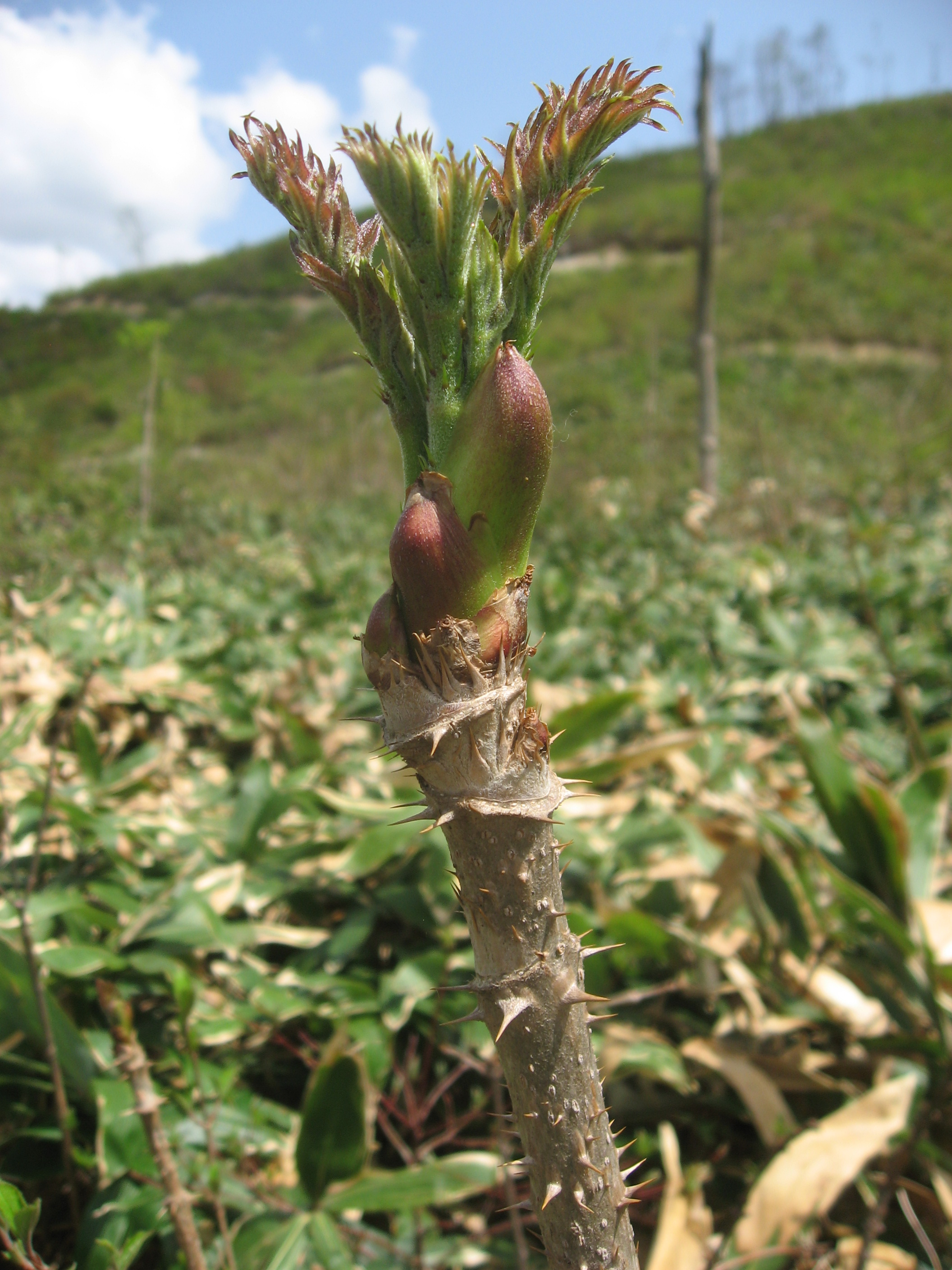 山菜タラノキ